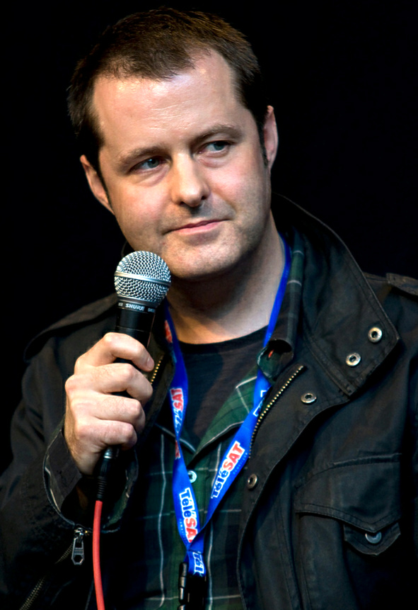 Brendan Muldowney